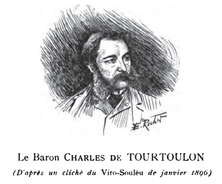 Carles de Tortolon